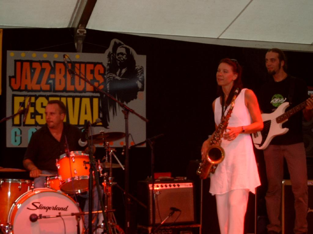 La formation belge Maxwell Street Blues Band au Jazz & Blues Festival de Gouvy en août 2003.